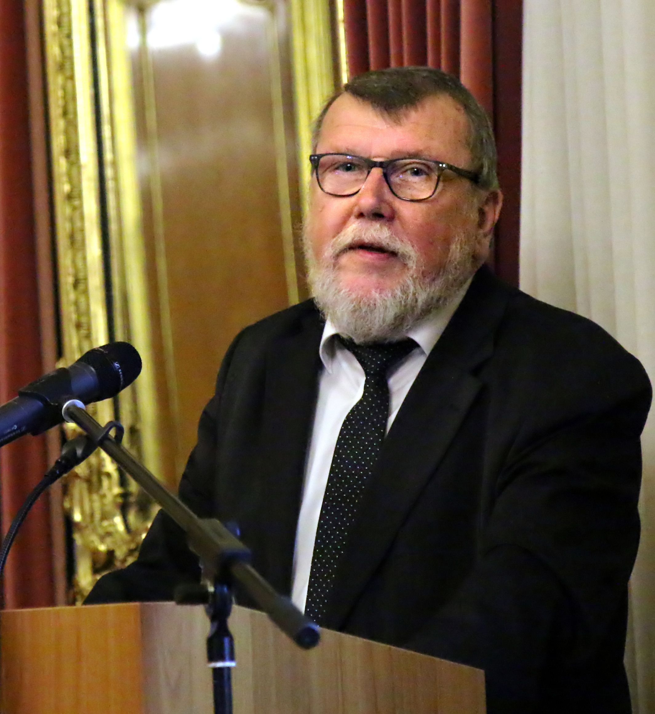 Prof. Dr. Dieter Wiedemann, Medienwissenschaftler, ehemaliger Rektor der "Filmuniversität Babelsberg Konrad Wolf", im Jahr 2018 in Hanau, als Laudator bei der Verleihung der zweiten "Grimm-Bürgerdozentur" im Schloss Philippsruhe